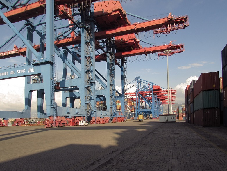 Containerhafen von Beirut